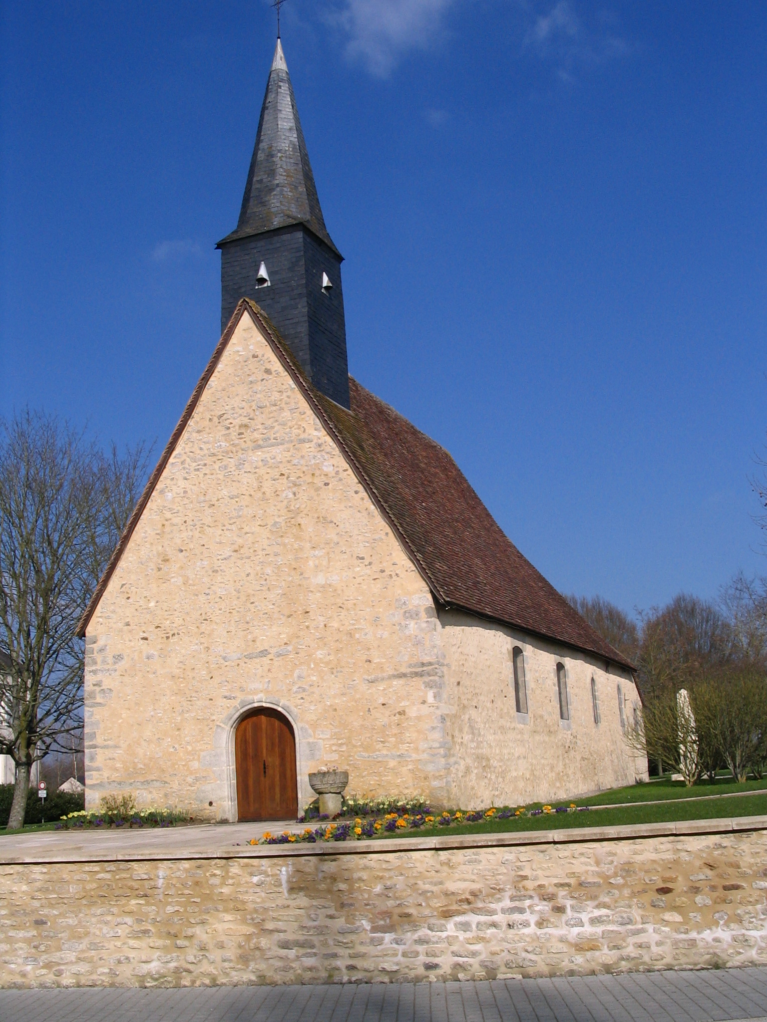 Église du Chevain, Sarthe, France